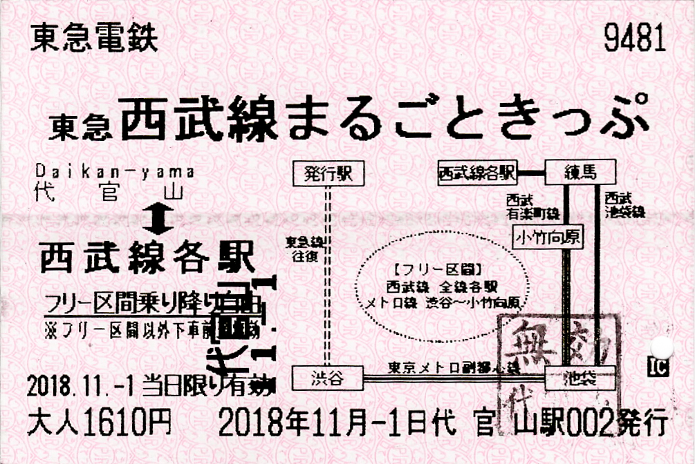 東急電鉄発行 東急・西武線まるごときっぷ